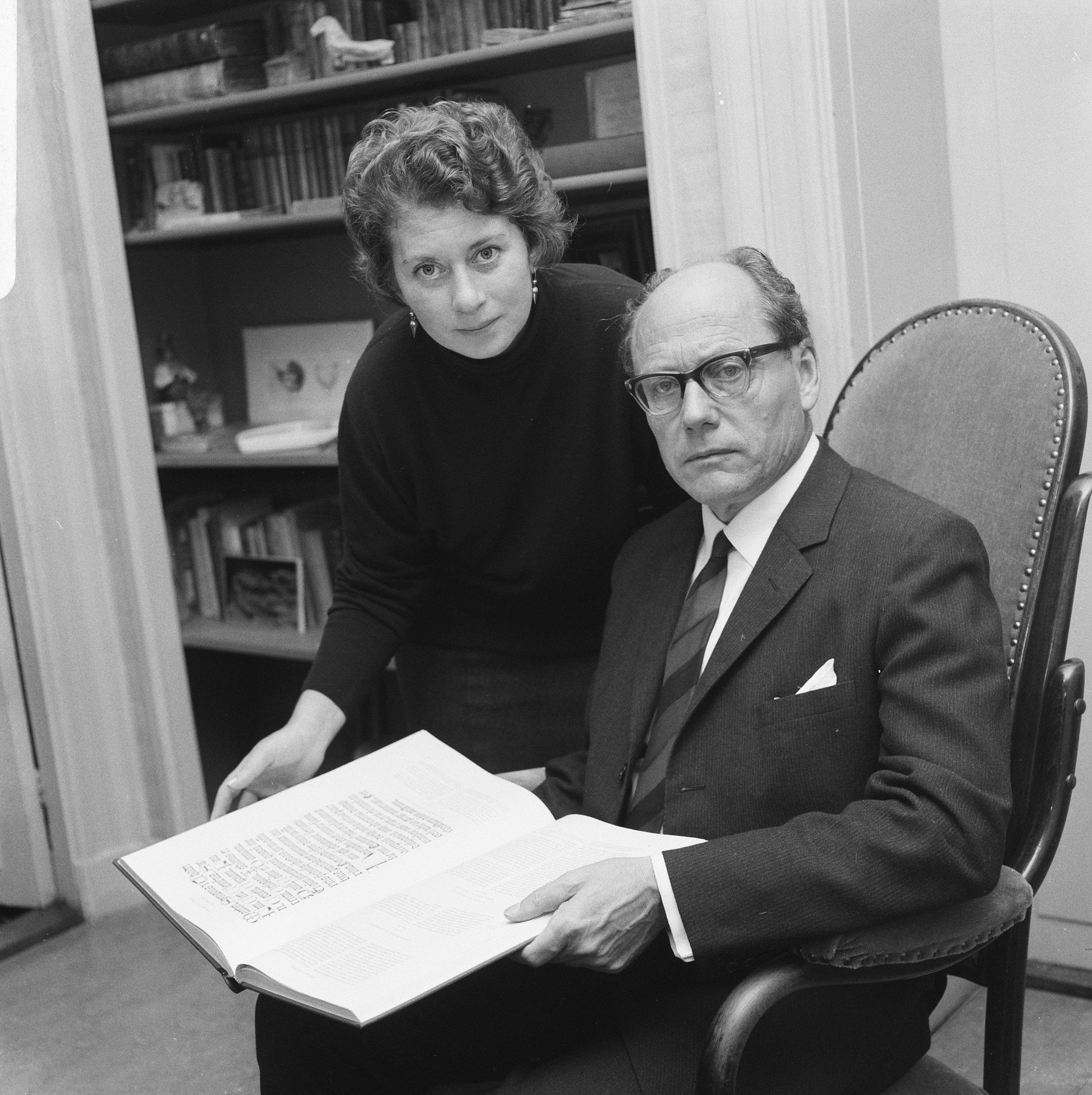 Collectie / Archief : Fotocollectie Anefo Reportage / Serie : Prof. Wytze Hellinga met zijn echtgenote Lotte Querido Beschrijving : professoren, groepsportretten, Hellinga, Wytze, Querido, Lotte Datum : 10 oktober 1966 Trefwoorden : groepsportretten, professoren Persoonsnaam : Hellinga, Wytze, Querido, Lotte Fotograaf : Kroon, Ron / Anefo Auteursrechthebbende : Nationaal Archief Materiaalsoort : Negatief (zwart/wit) Nummer archiefinventaris : bekijk toegang 2.24.01.03 Bestanddeelnummer : 919-6646